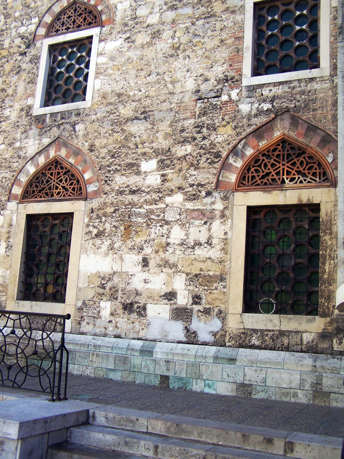 Régi török dzsámi (Pécs, Széchenyi tér) This is a photo of a monument in Hungary, Identifier: 18015